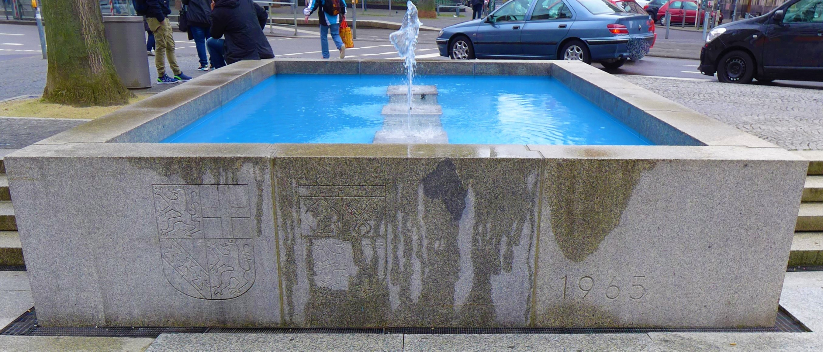 Brunnen vor dem Rathaus Saarbrücken